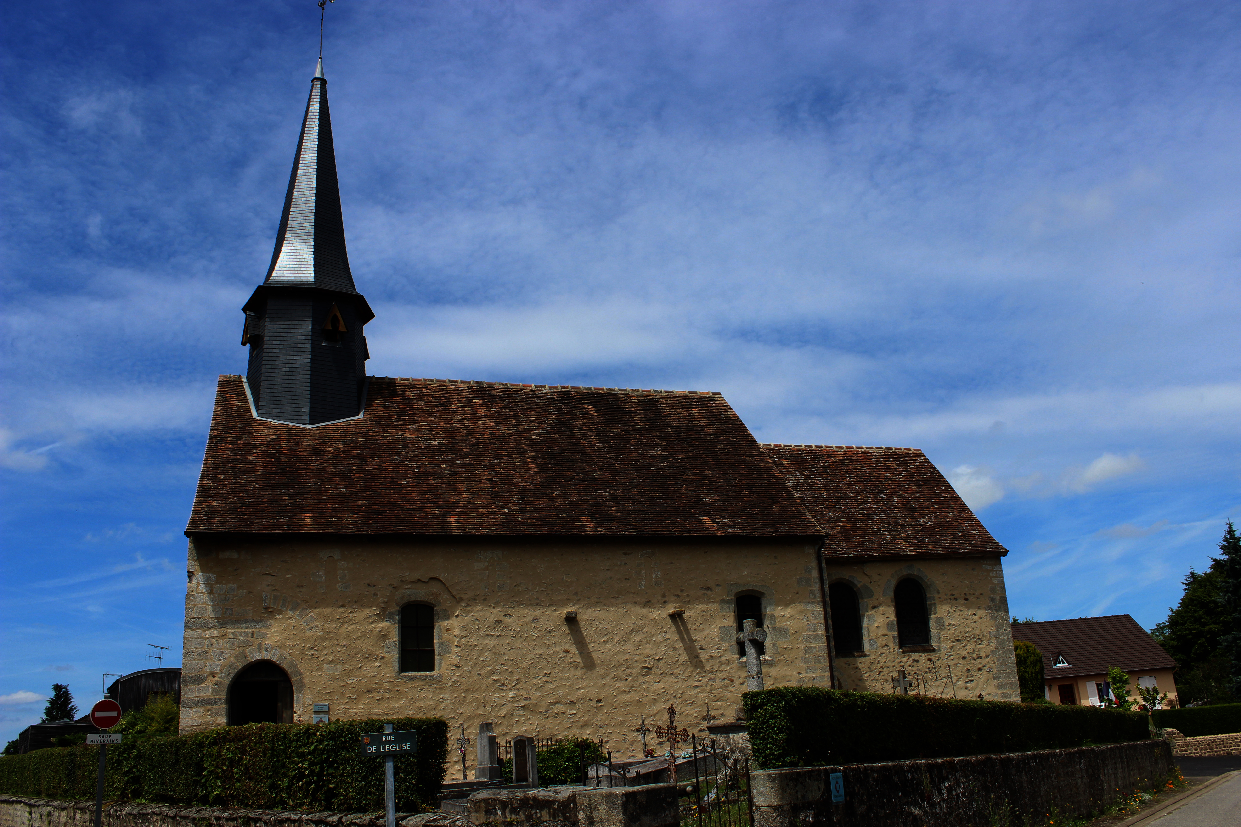 église de Cerisé (61)